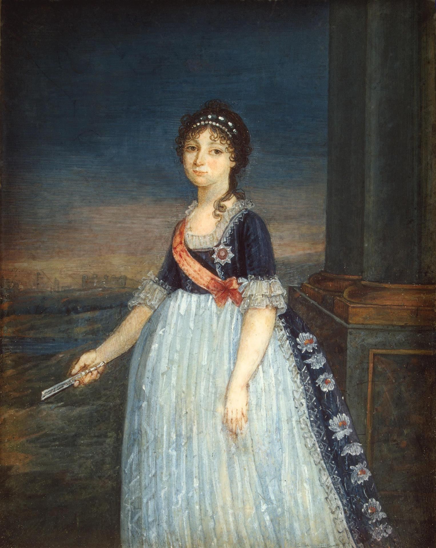 Миниатюра: Портрет великой княгини Анны Федоровны